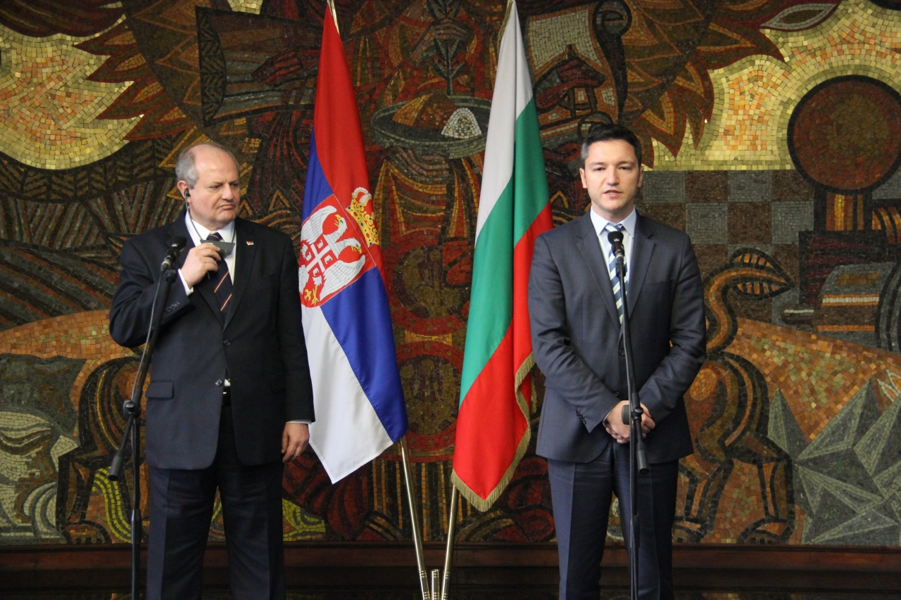 Брифинг за журналисти